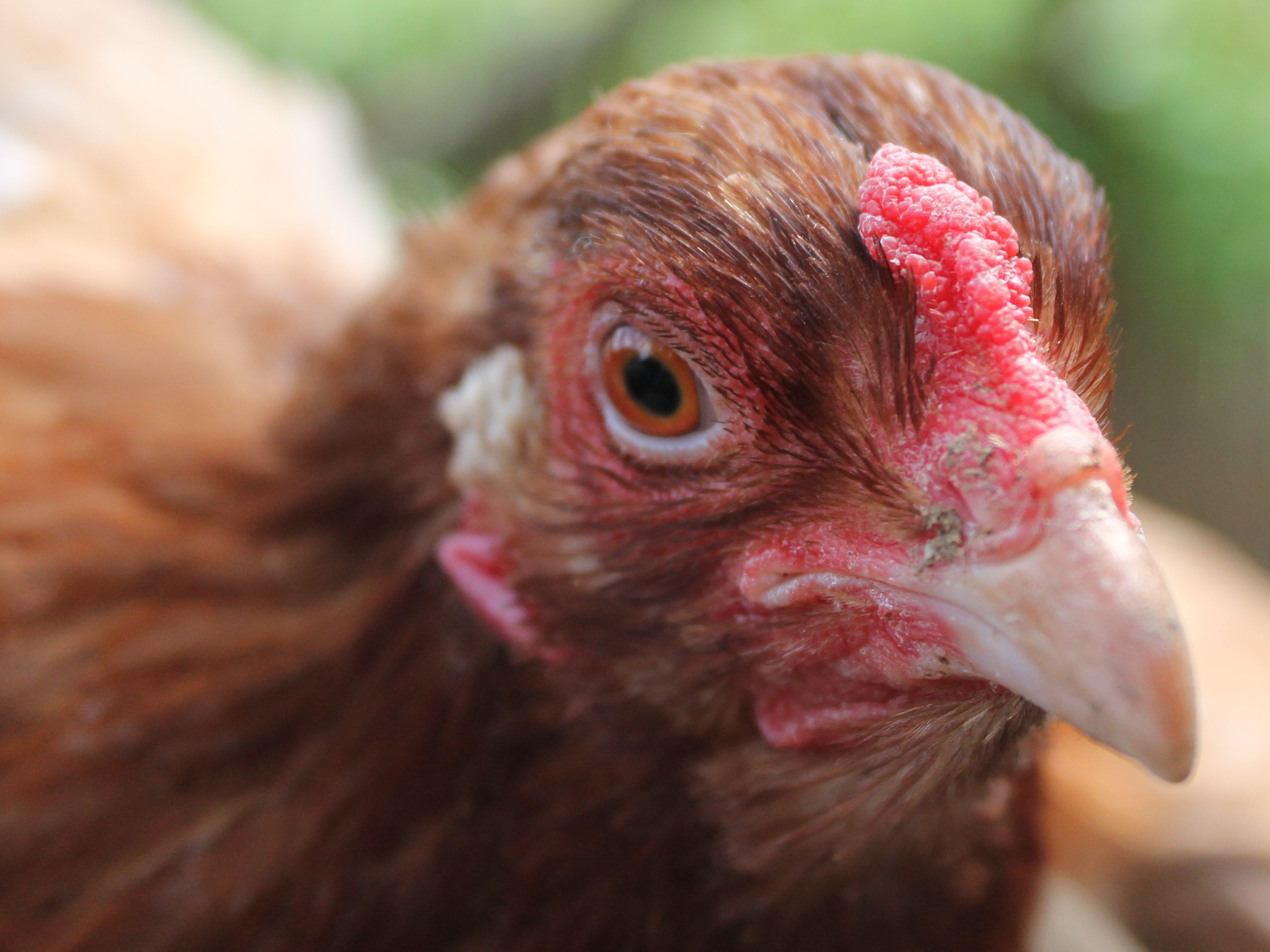 Rassetypische Kopfpunkte einer Cubalaya-Henne (hier: blau-zimtfarbig)